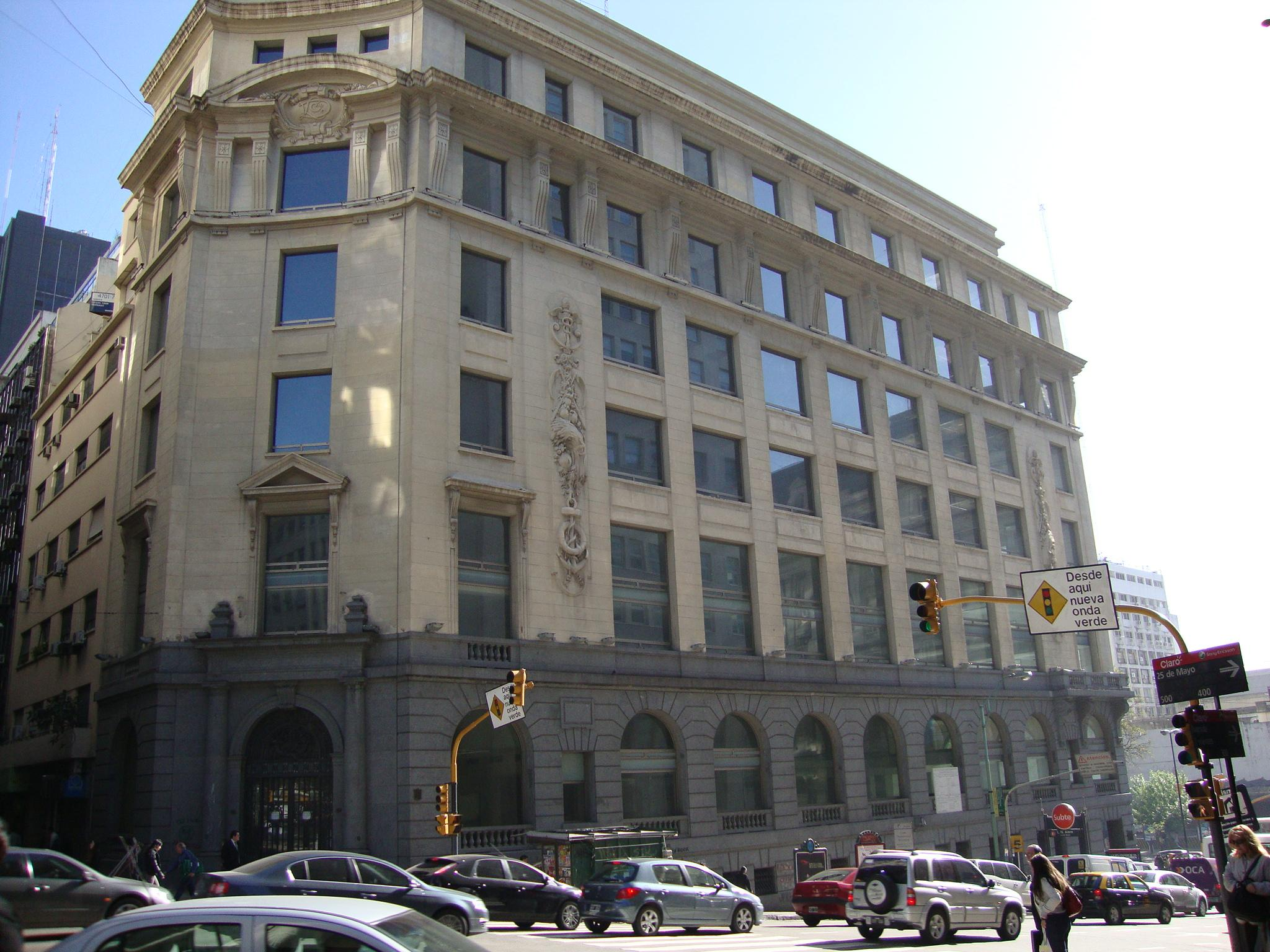 El Edificio Dreyfus (1925), ubicado en la Av. Corrientes, entre la Av. Leandro N. Alem y la calle 25 de Mayo. Buenos Aires, Argentina.